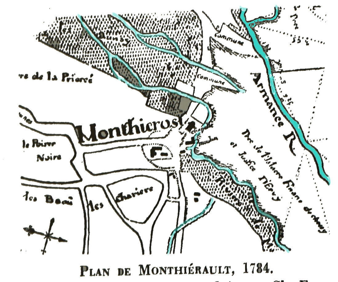 carte issue du fonds de s archives départementaels de l'aube.